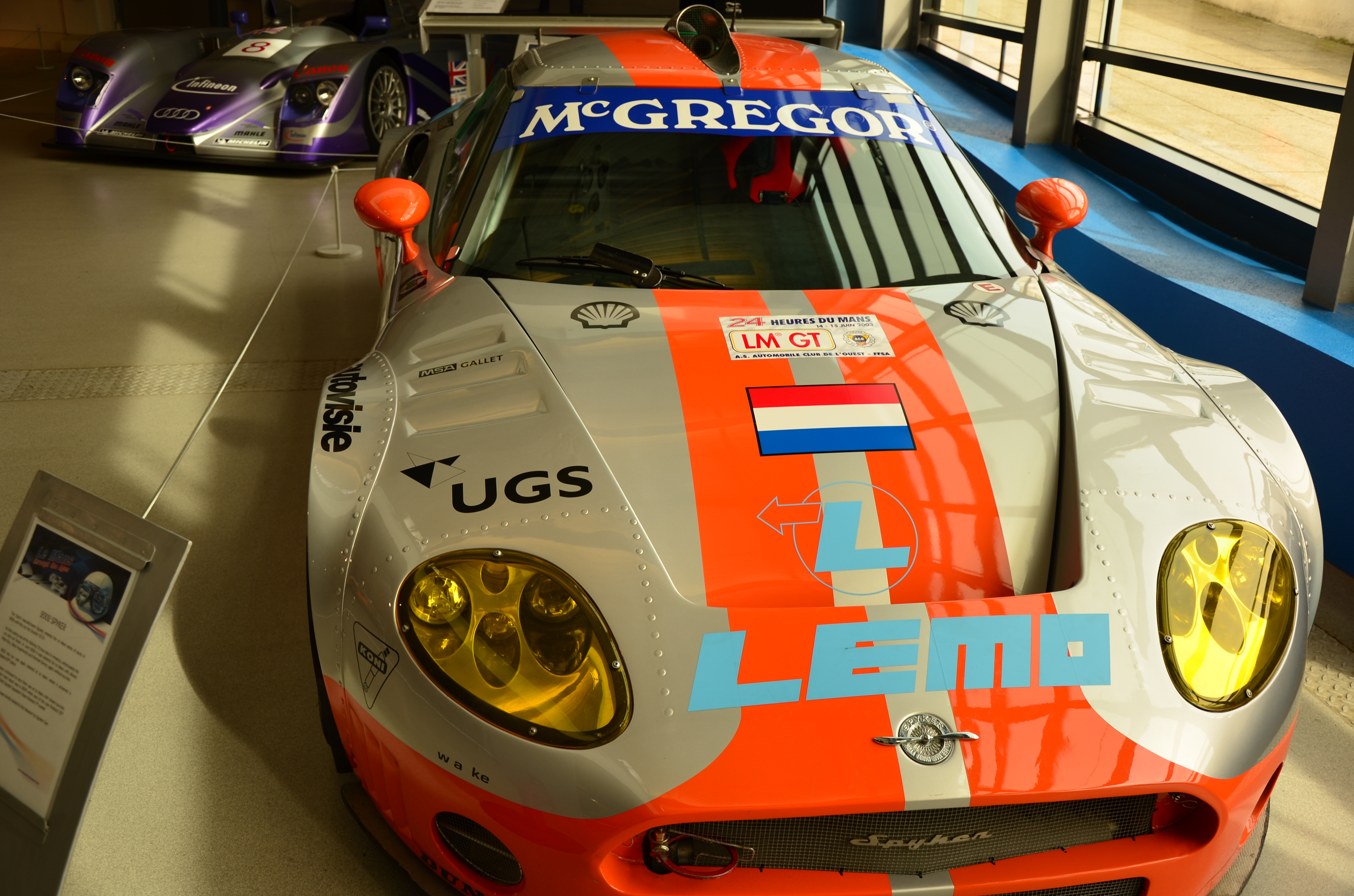 2002 Le Mans Spyker